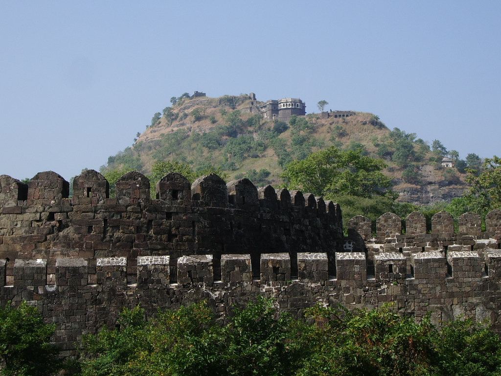 ダウラタバード要塞